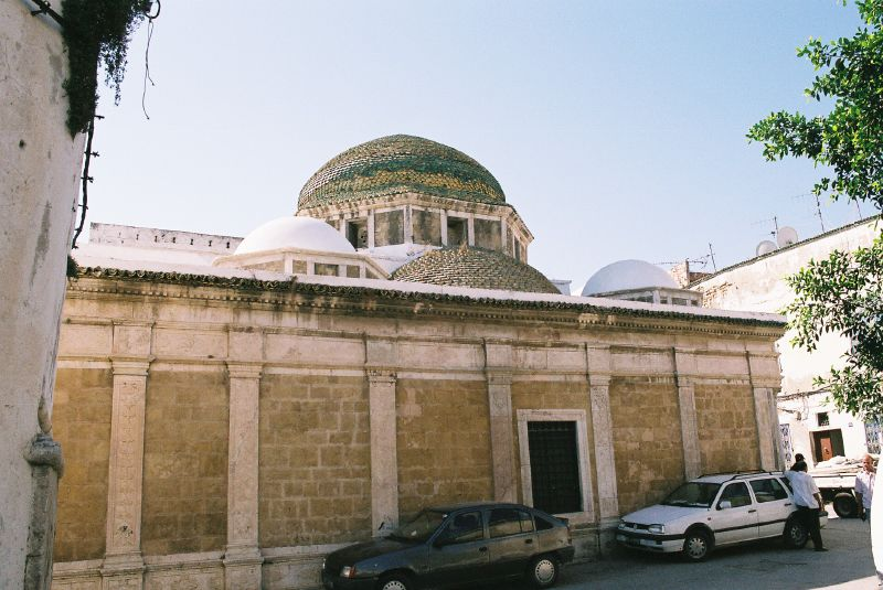 Mausolée Tourbet El Bey (Tunis)